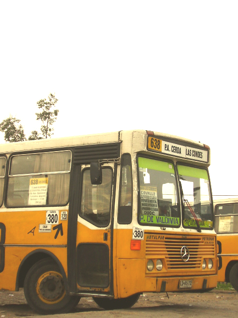 "algún día será transantiago y llegaré mas atrasada aun.:("